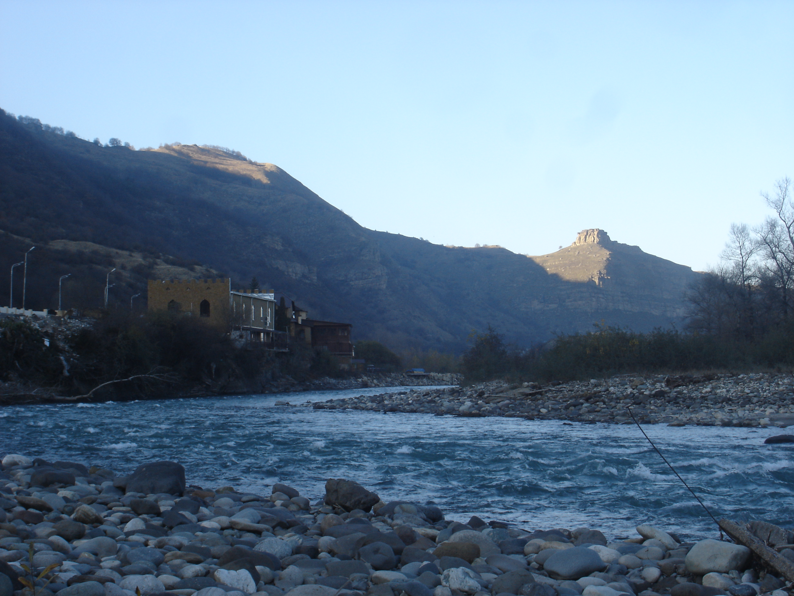 Карачаевск, республика Карачаево-Черкессия, Россия.